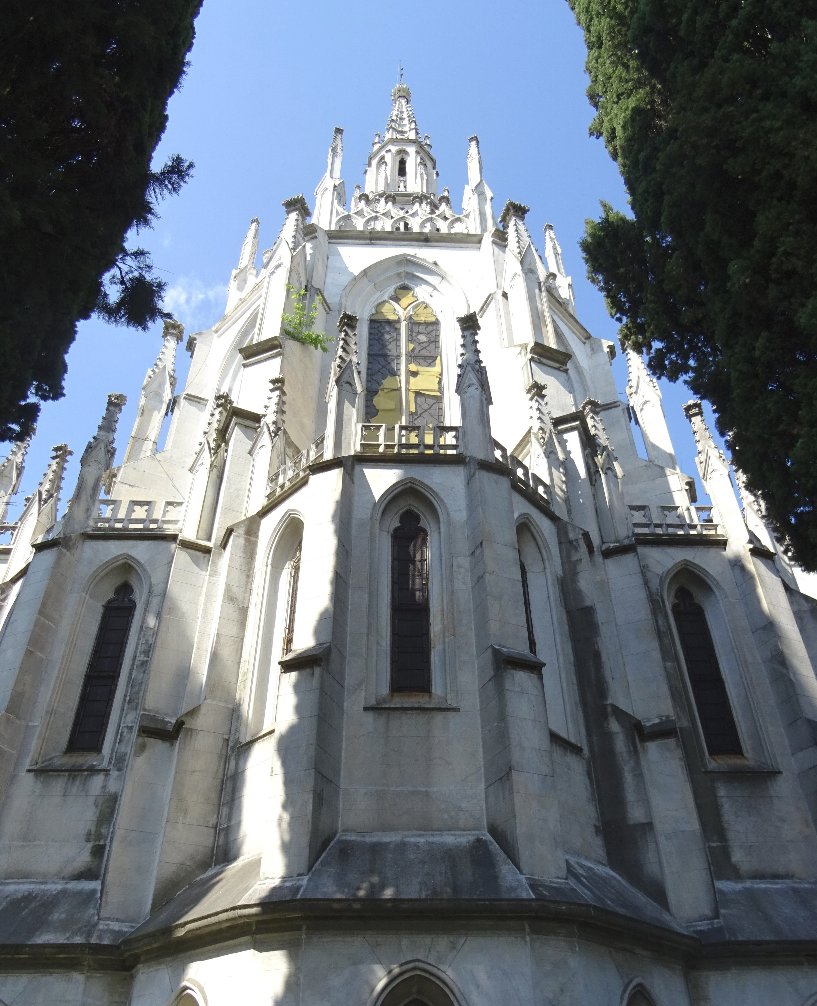 Mausoleo Visconti di Modrone